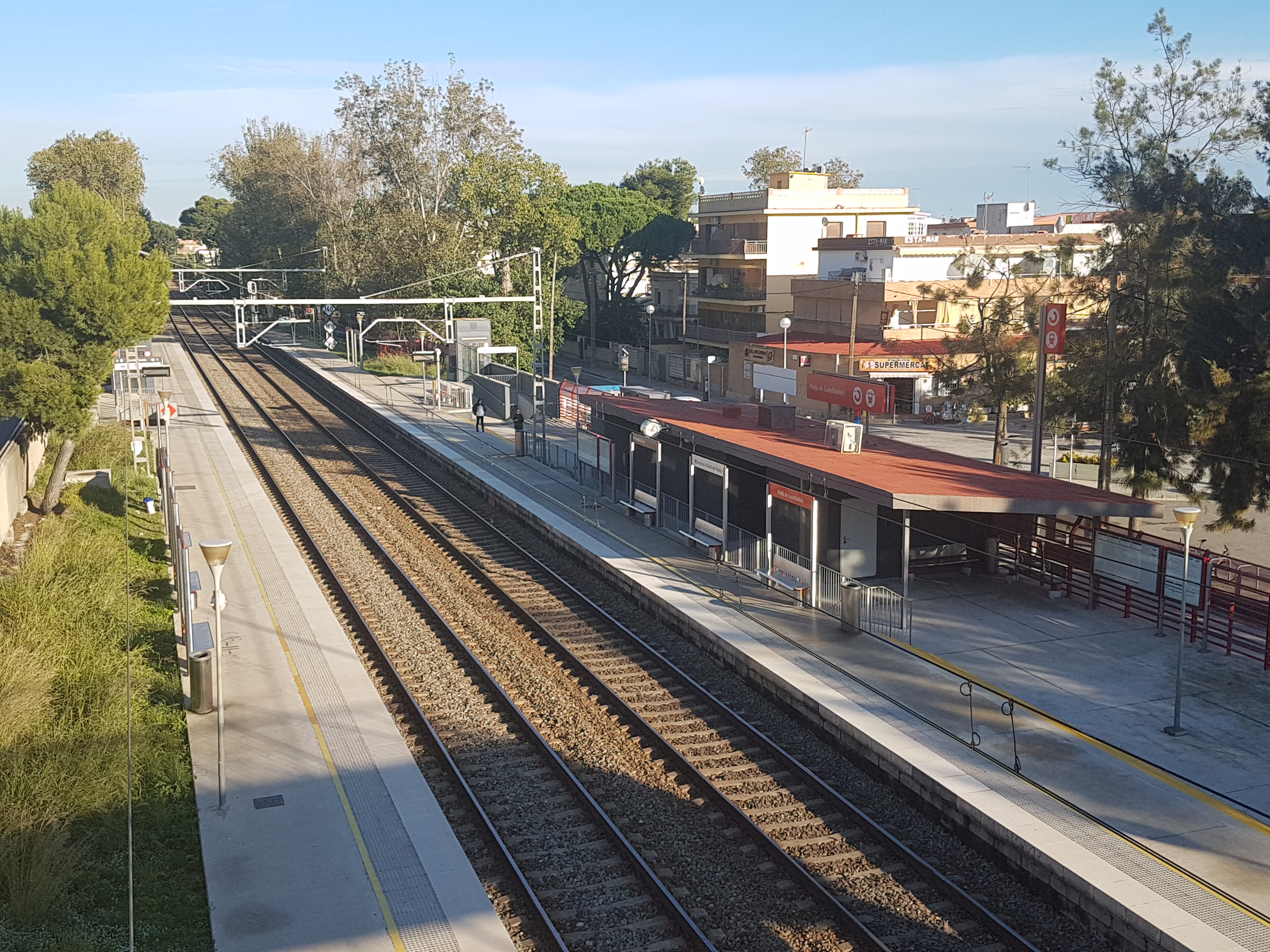 Estació de Platja de Castelldefels de la línia Barcelona-Vilanova-Valls